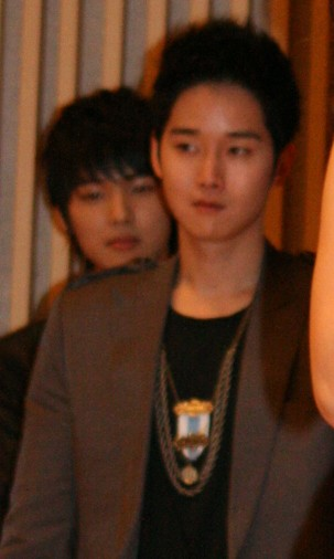 괜찮아 아빠딸 제작발표회